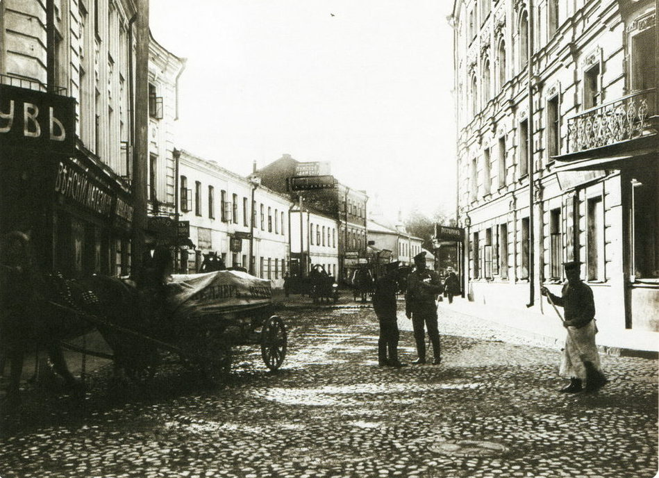 Малая Бронная улица. Москва. 1914. Из коллекции Э. В. Готье-Дюфайе